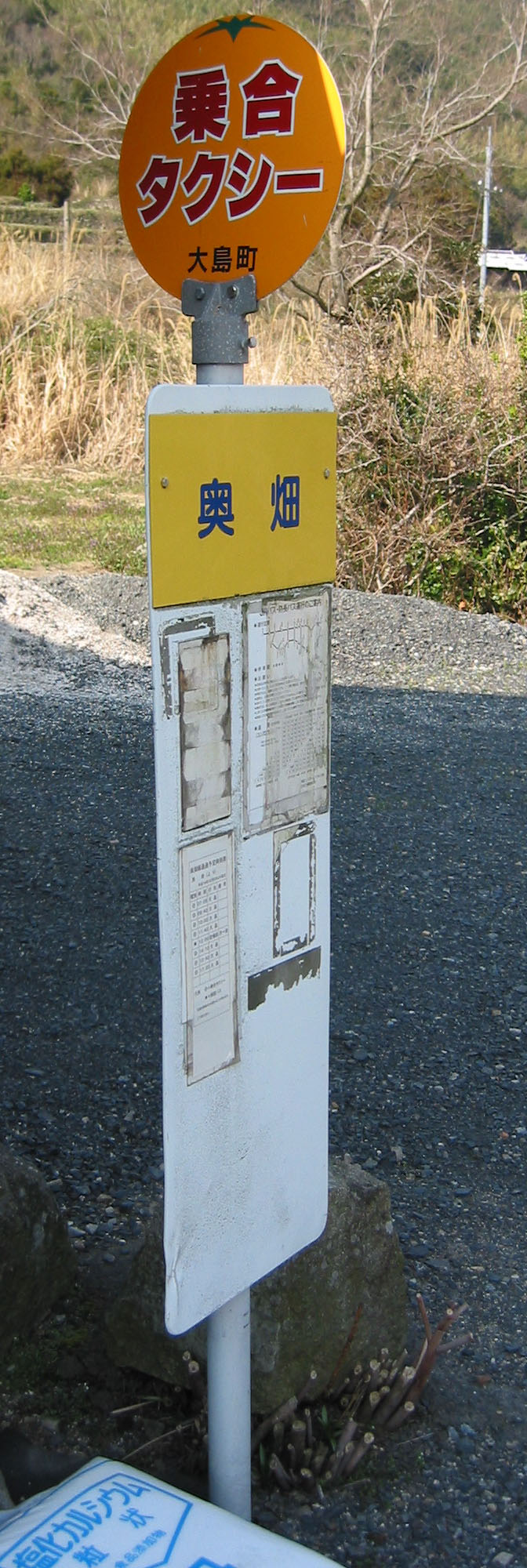 大島観光タクシー（山口県） 乗合タクシー奥畑線の停留所